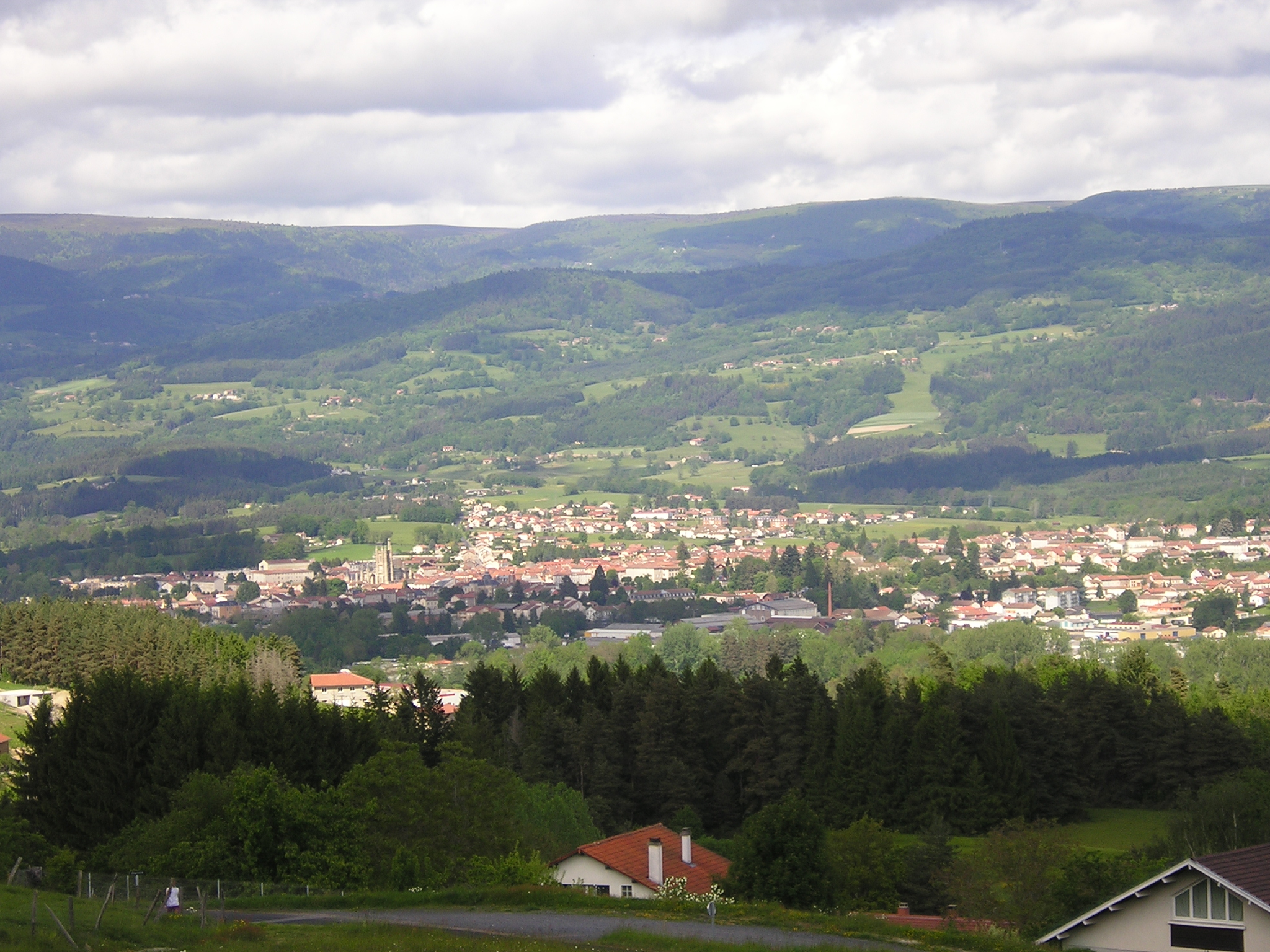 Photo de la vallée d'Ambert vue du Montel